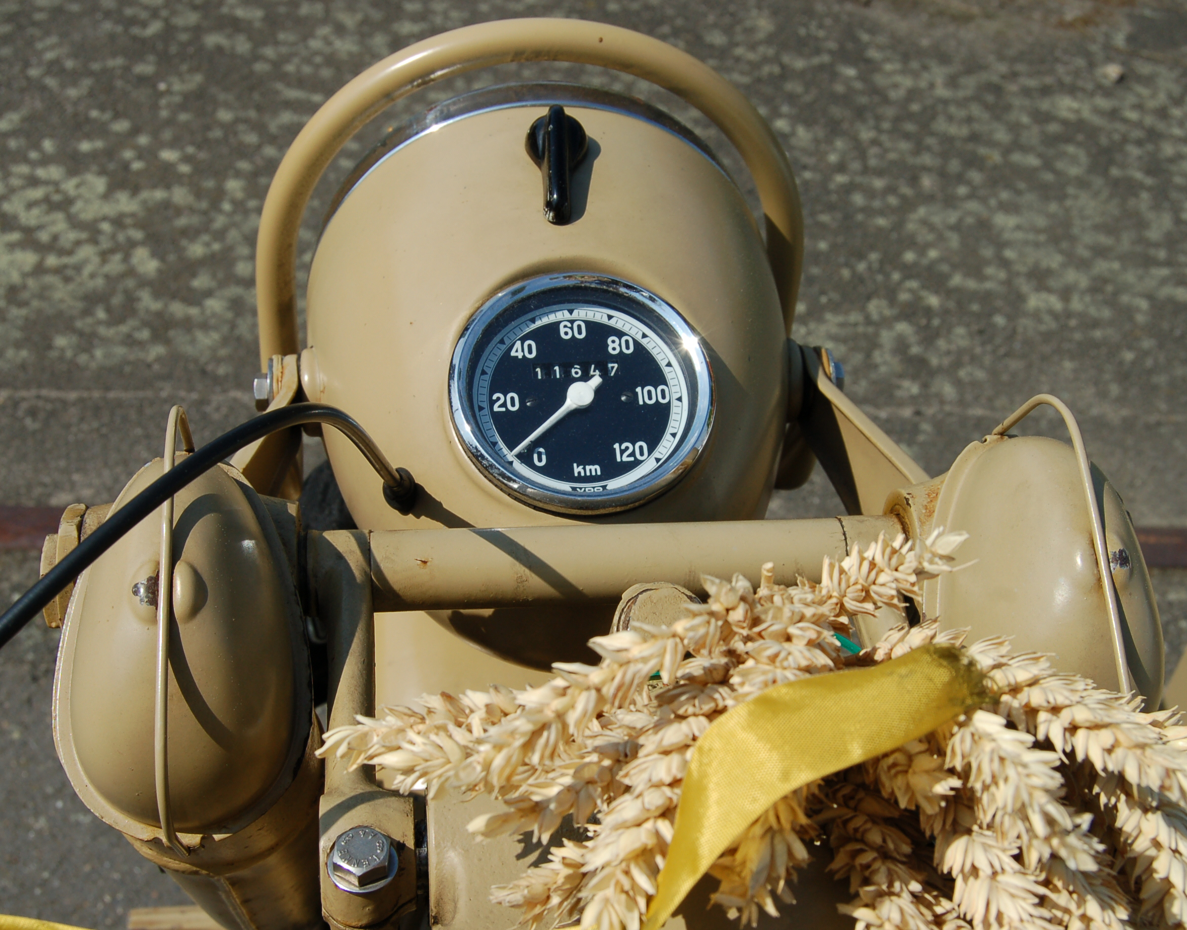 Scheinwerfer und Tachometer einer Zündapp KS 750